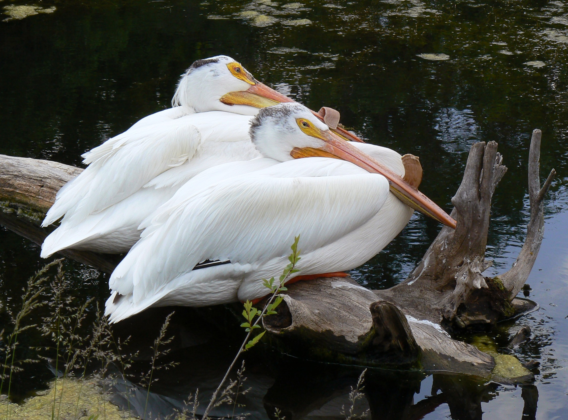 White pelicans